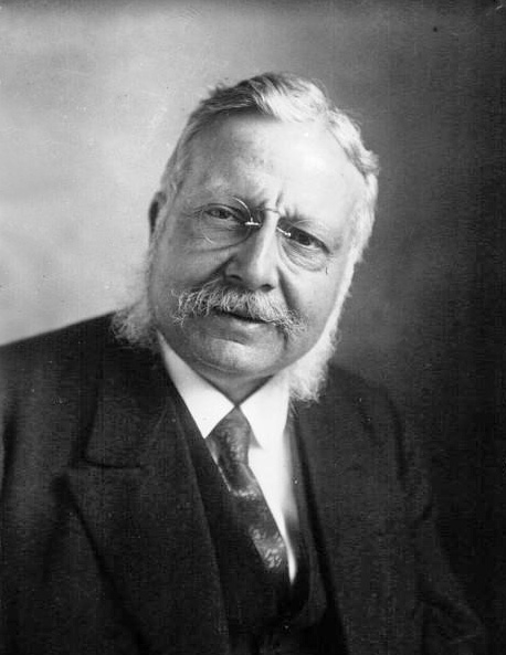 Bonnevay, député (Rhône) : photographie de presse